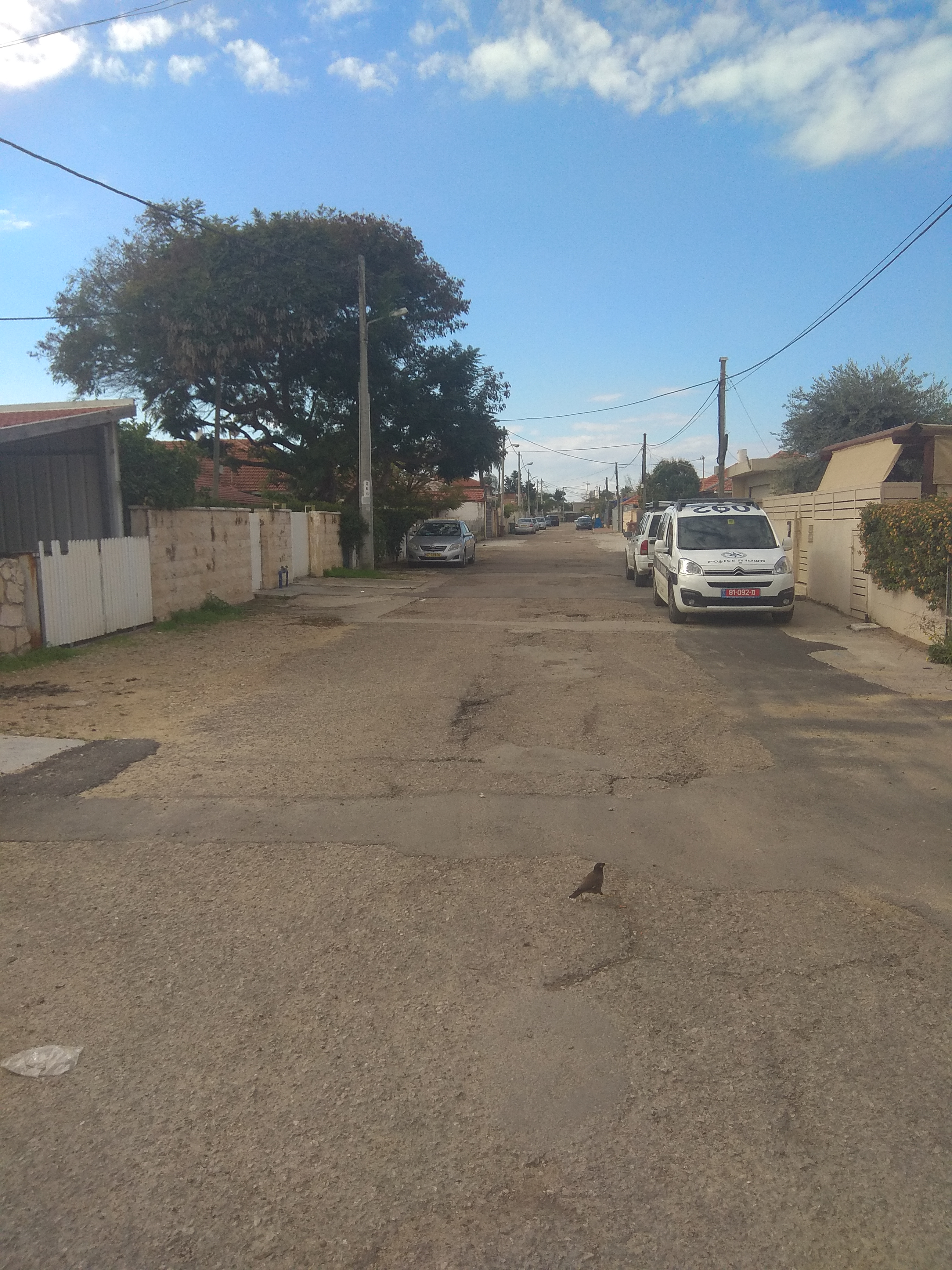 רחוב בשכונה